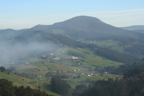 Foto de Linares (Salas - Asturies) Tomada desde El Barrio (Mallecina)